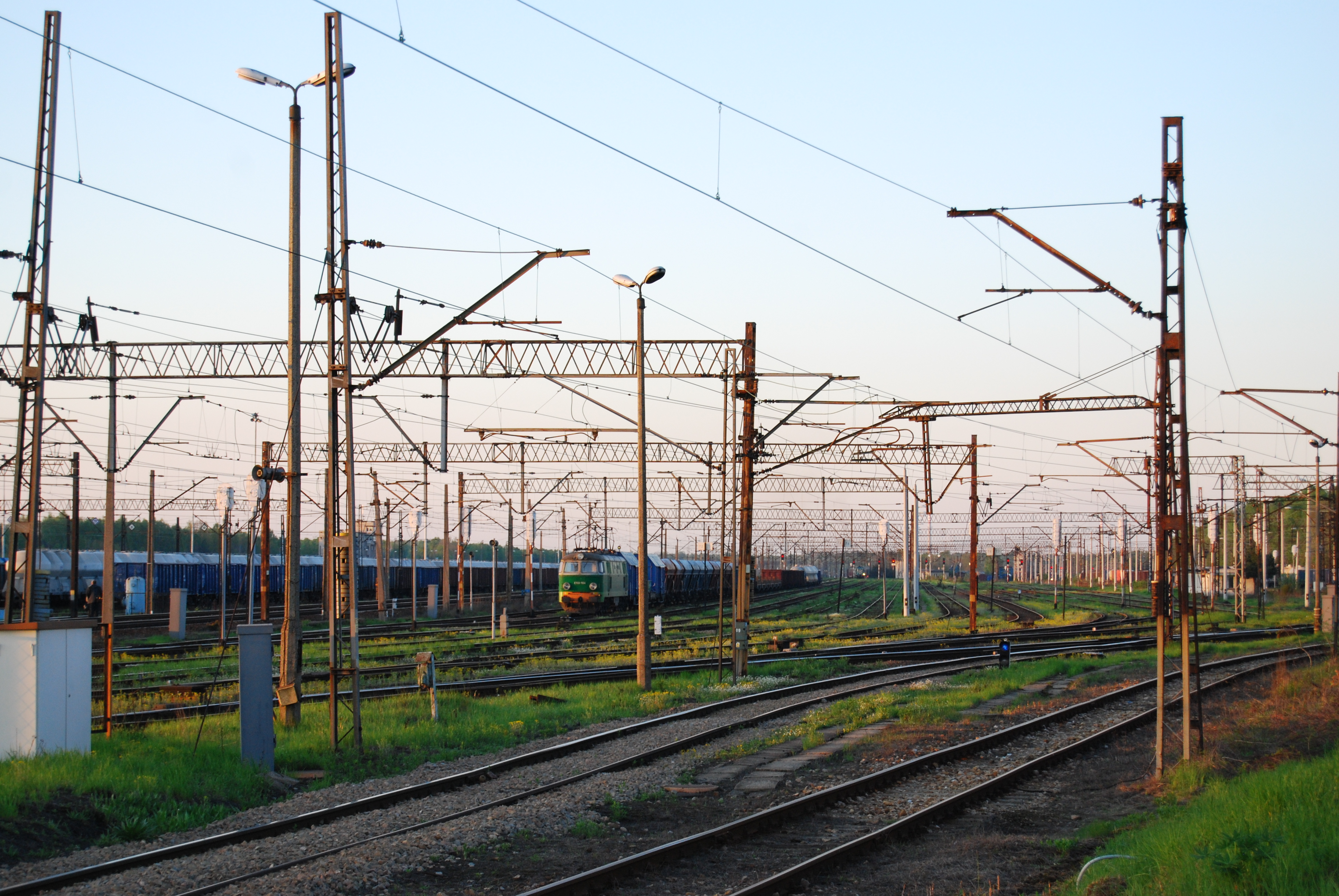 Stacja Tarnowskie Góry grupa TW